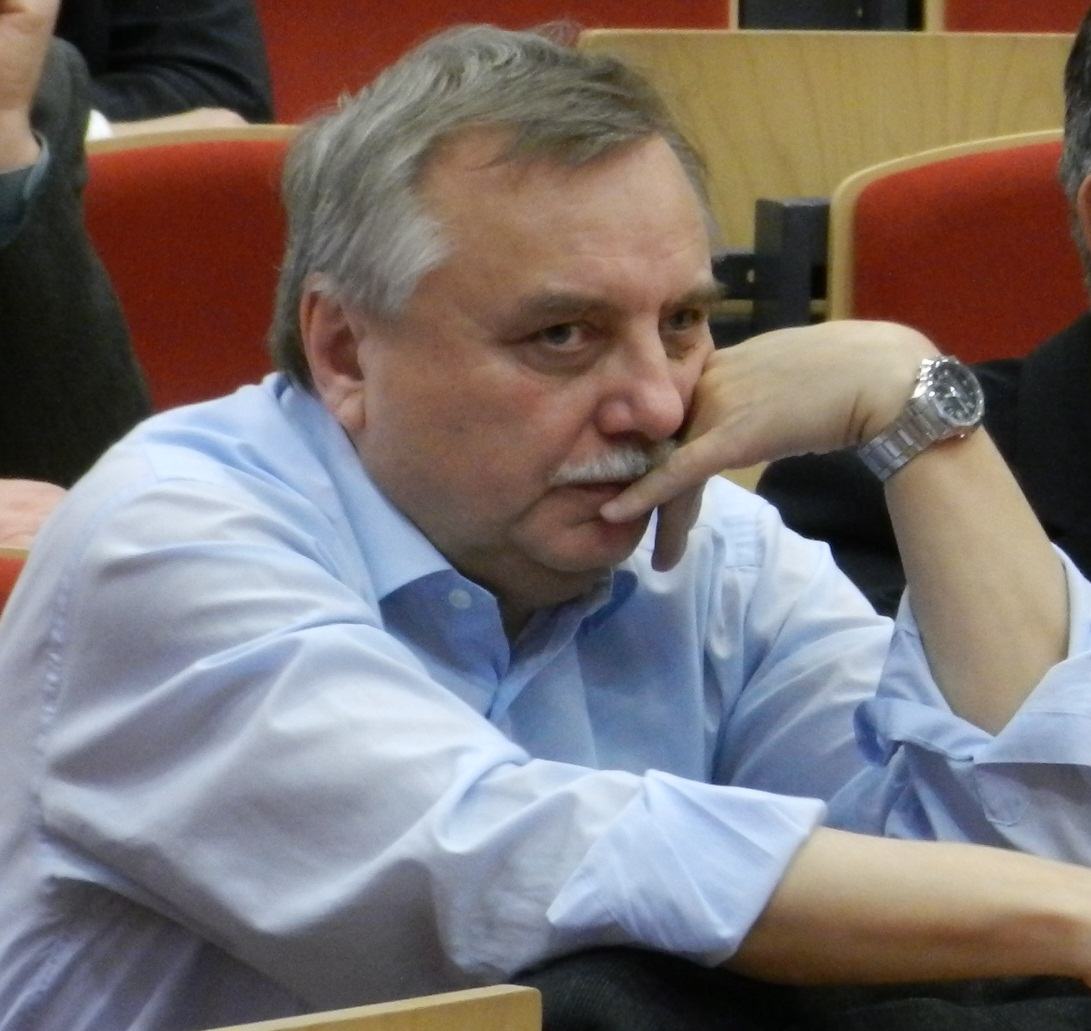 osobní foto